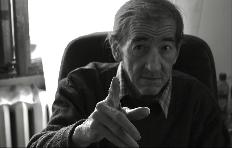 Marsall László (Szeged, 1933. november 3. – Budapest, 2013. június 25.[1]) Kossuth-díjas magyar költő, a Digitális Irodalmi Akadémia tagja. Költeményei a korszak sajátosan megélt és feldolgozott lenyomatai, a 20. század második felének és a 21. század elejének egyik jelentős magyar költője.